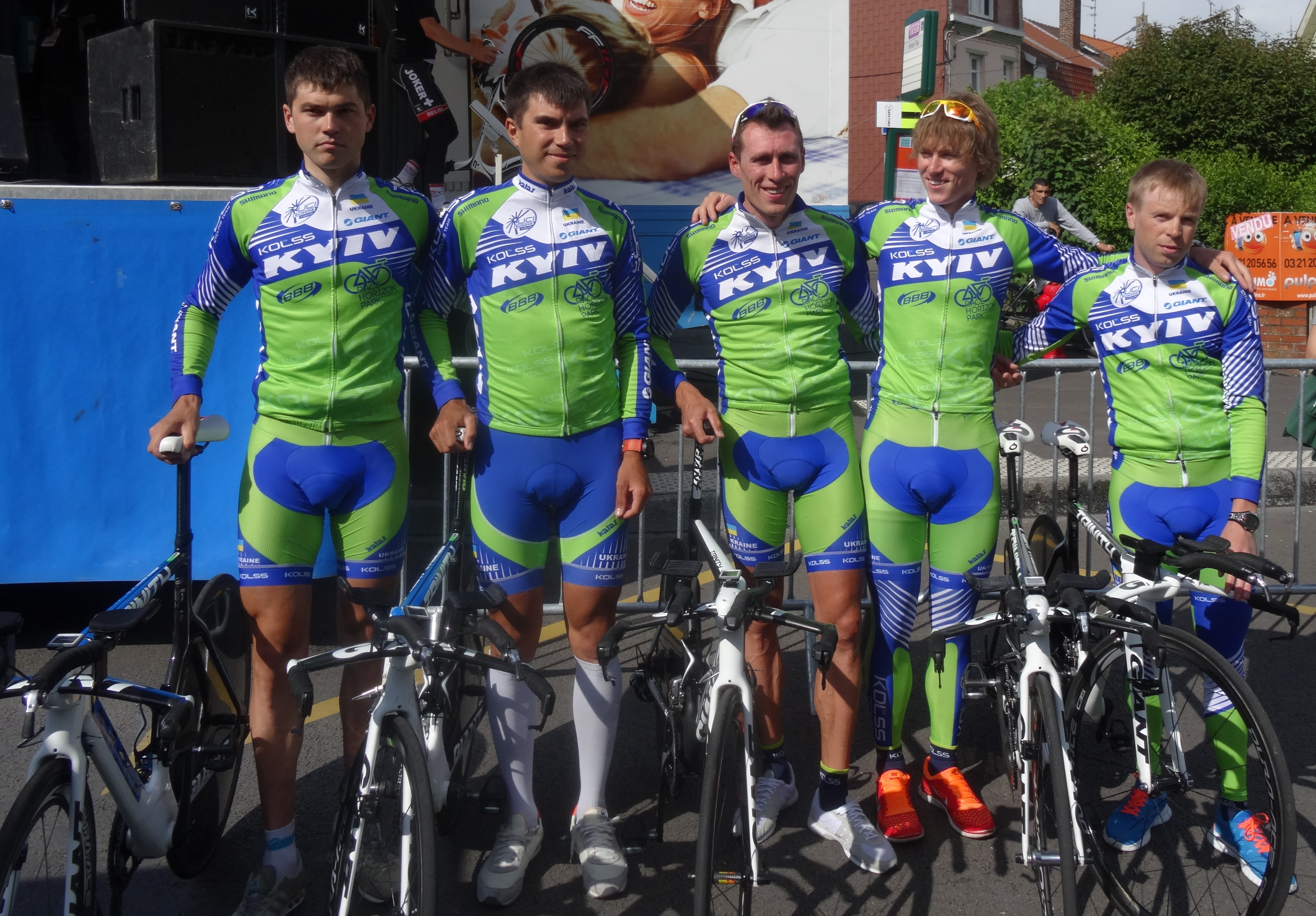 Reportage photographique réalisé le vendredi 23 mai 2014 à l'occasion du départ de la première étape du Paris-Arras Tour 2014 à Lens, Pas-de-Calais, Nord-Pas-de-Calais, France. Depicted people: Andrii Bratashchuk, Oleksandr Polivoda, Oleksandr Kvachuk, Oleksandr Golovash and Oleksandr Prevar